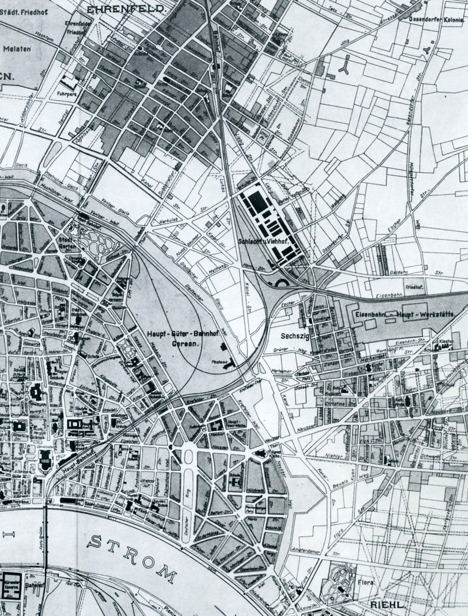 Übersichtskarte der Stadt „Cöln“ von Stadtbaumeister Carl Steuernagel des Jahres 1902. Ausschnitt der nördlichen Bereiche der Alt- und Neustadt mit Vororten, Karte 28